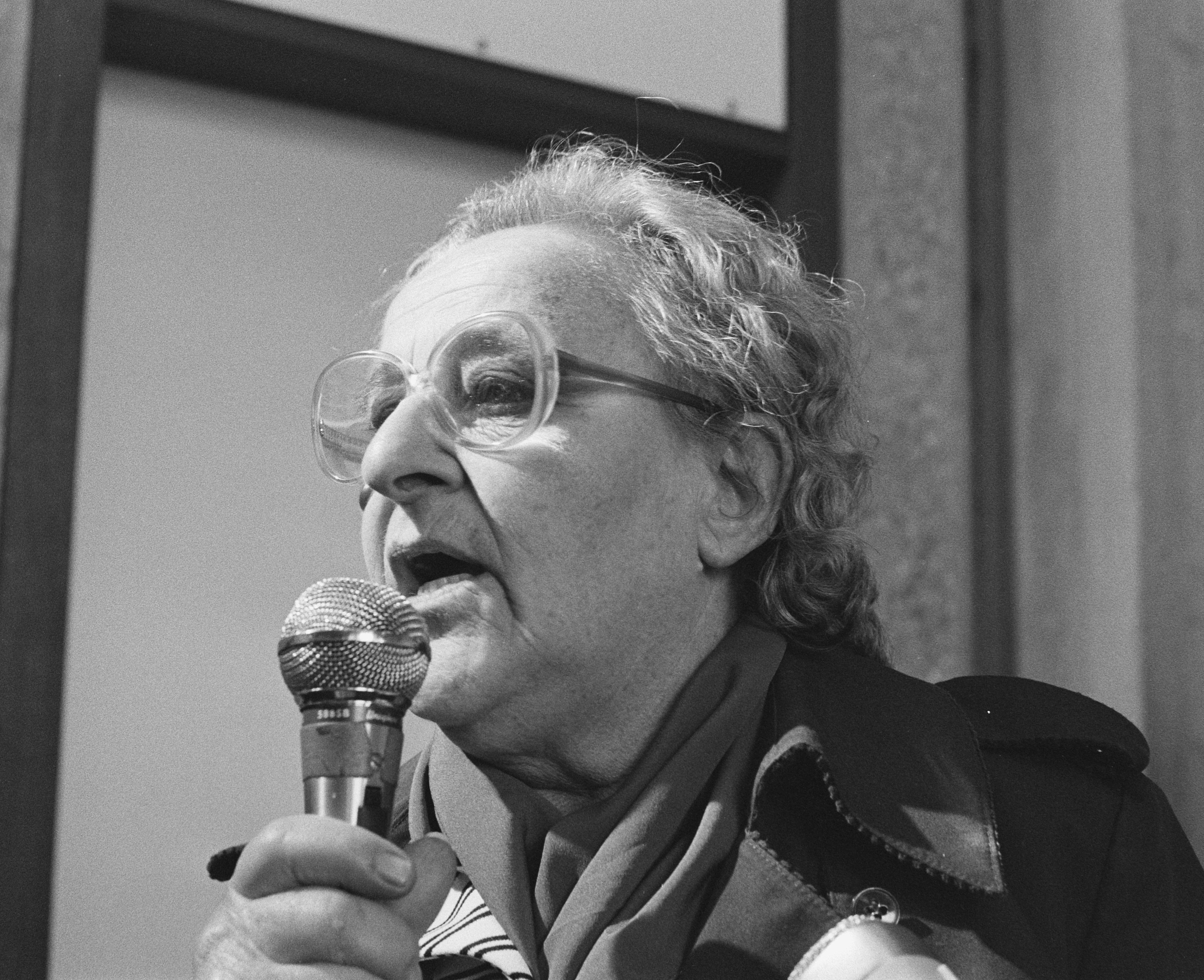 Collectie / Archief : Fotocollectie Anefo Reportage / Serie : [ onbekend ] Beschrijving : Uitspraak proces huuractievoerders; nr. 28 , 29: huuractievoerster Marie Altelaar , nr. 30 , 31: publiek in rechtszaal met protestbord Datum : 19 september 1986 Trefwoorden : Actievoerders, huren, rechtszalen Fotograaf : Croes, Rob C. / Anefo Auteursrechthebbende : Nationaal Archief Materiaalsoort : Negatief (zwart/wit) Nummer archiefinventaris : bekijk toegang 2.24.01.05 Bestanddeelnummer : 933-7677